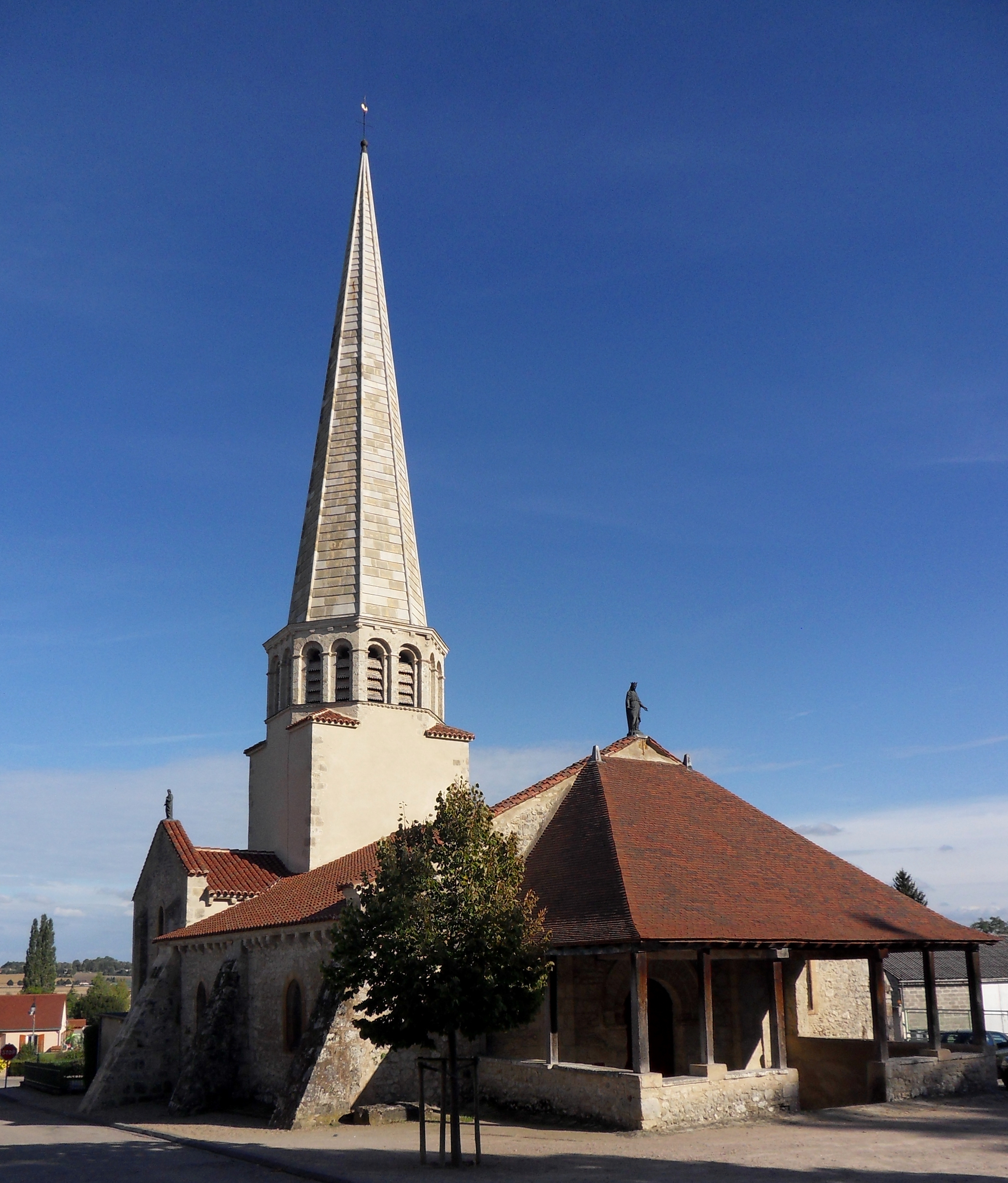 Église Saint-Julien, (Classé, 1929)